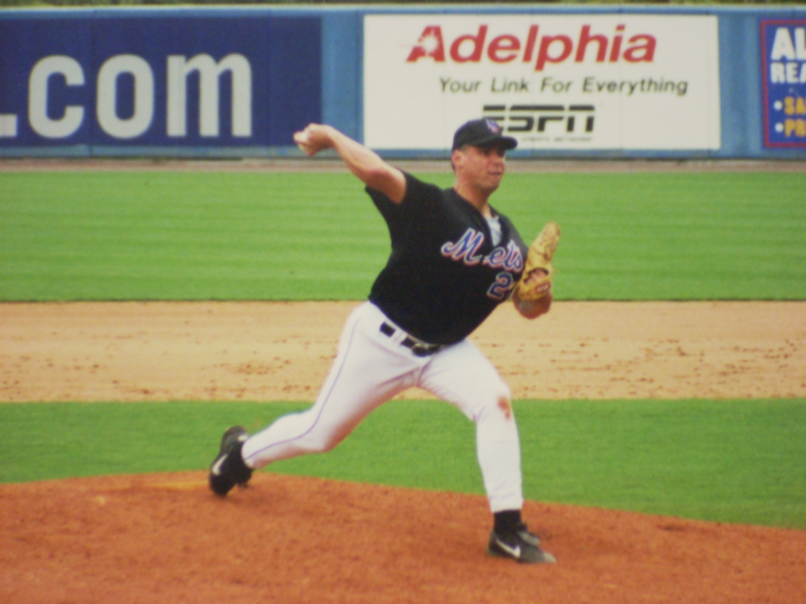 Mark Leiter, New York Mets